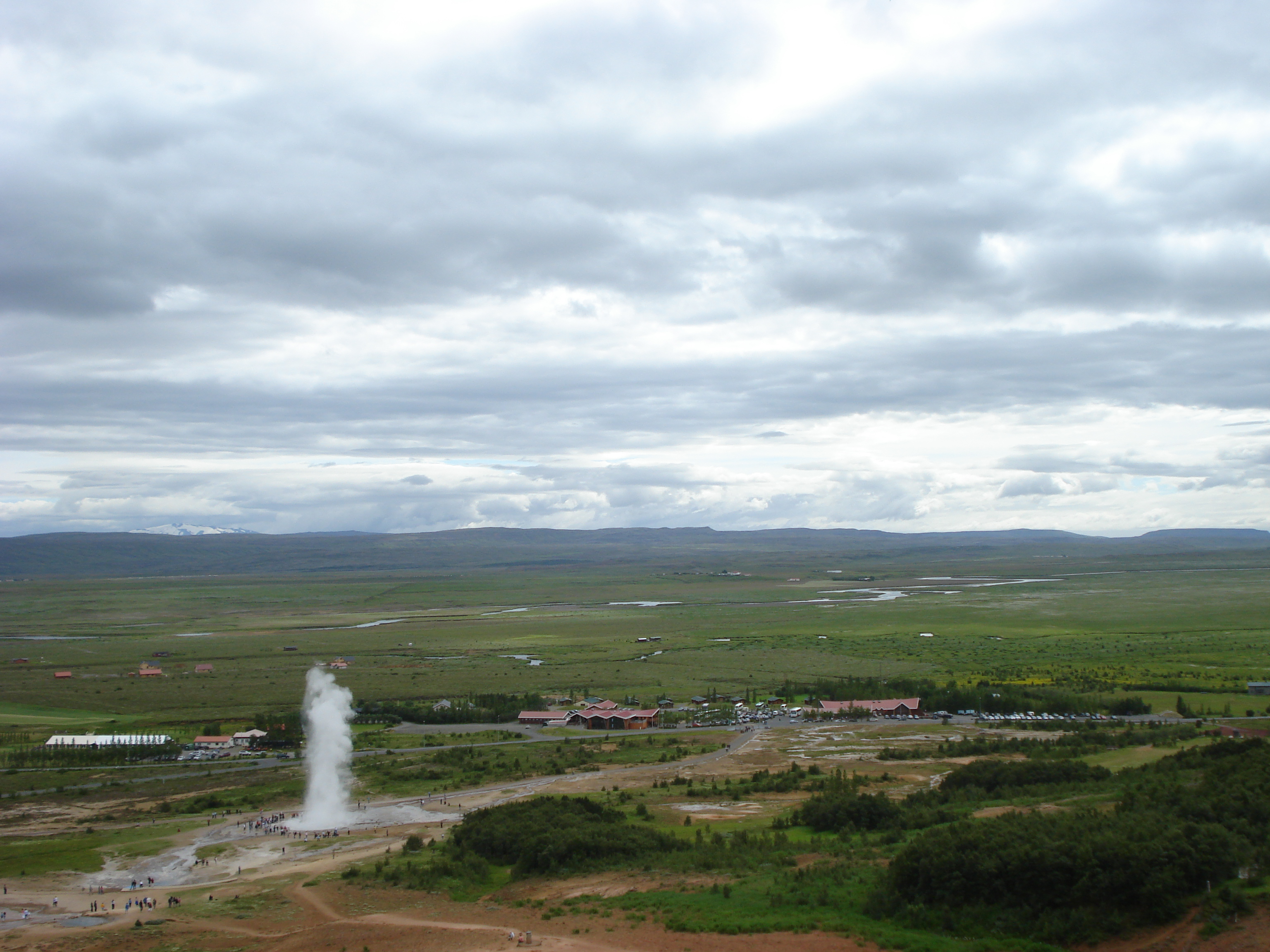 Geysir Strokkur, Iceland